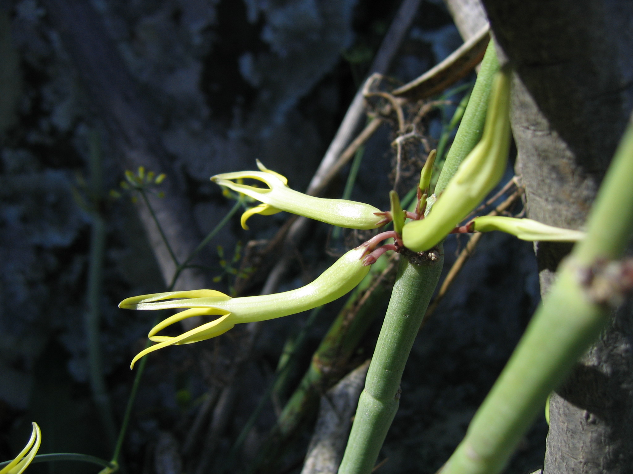 Ceropegia dichotoma krainzii Sventenius, near Garachico, Tenerife, Canary Islands